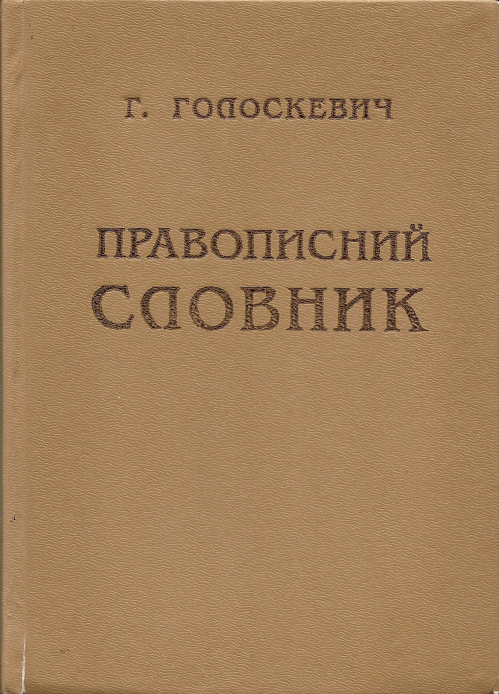 Г. Голоскевич. Правописний словник. палітурка книги